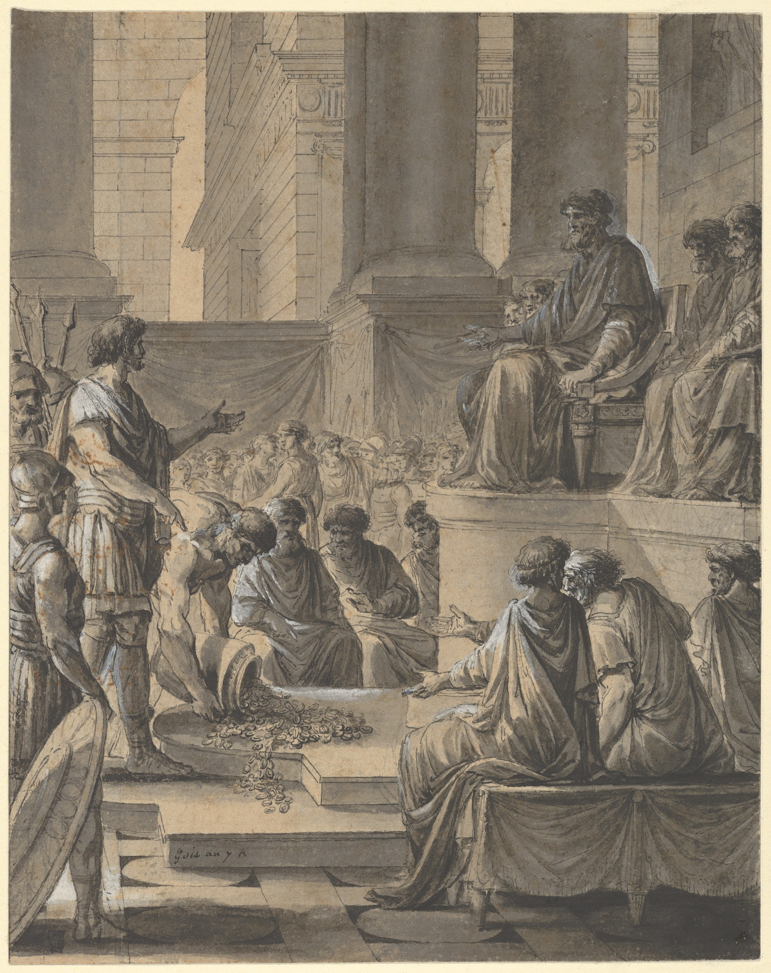 Drawing; Drawings